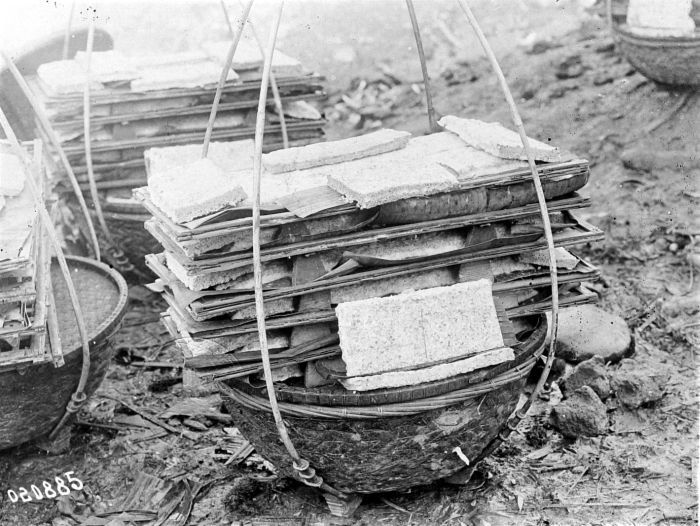 Dagangan tempe di Jawa